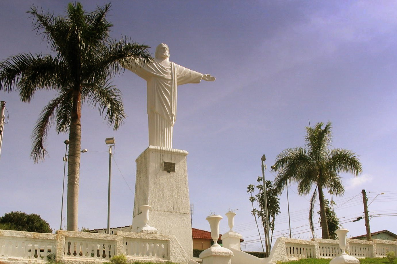 Cristo em Araras